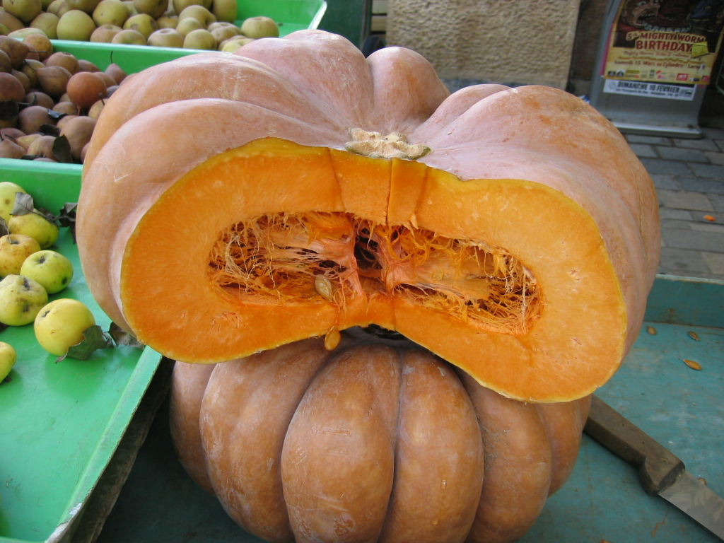 Citrouille